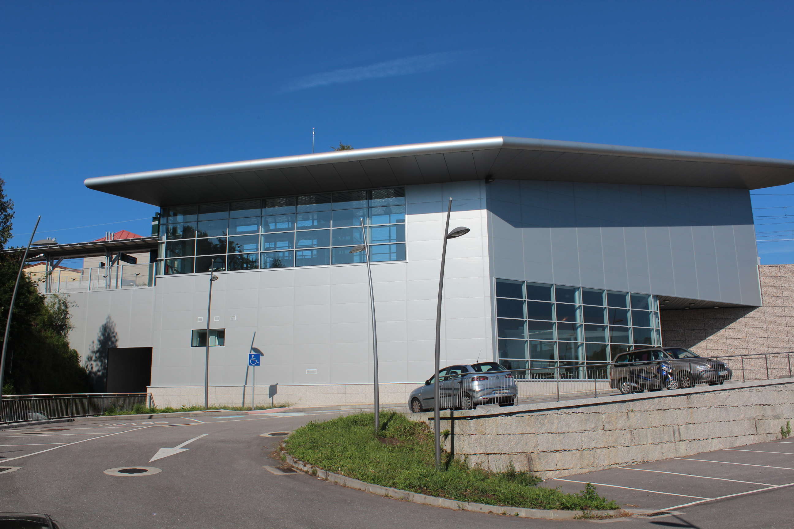 Estación do AVE en Redondela.